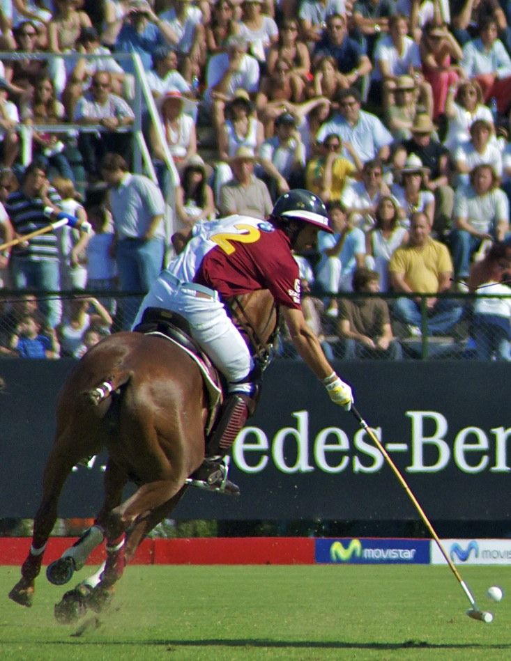 Campeonato Argentino de Polo 2010